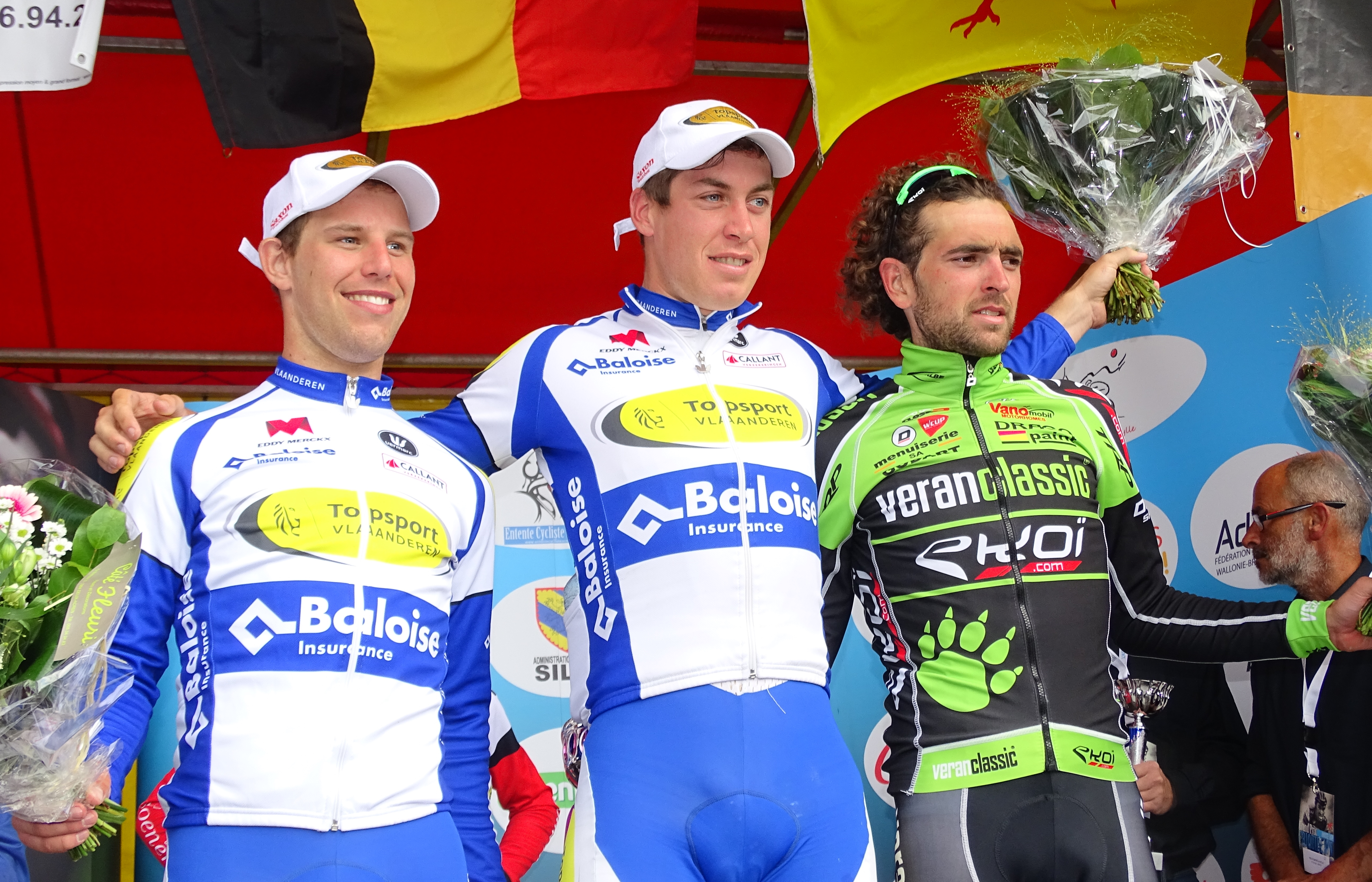 Reportage réalisé le dimanche 17 mai à l'occasion de l'arrivée du Grand Prix Criquielion 2015 à Deux-Acren, Belgique.